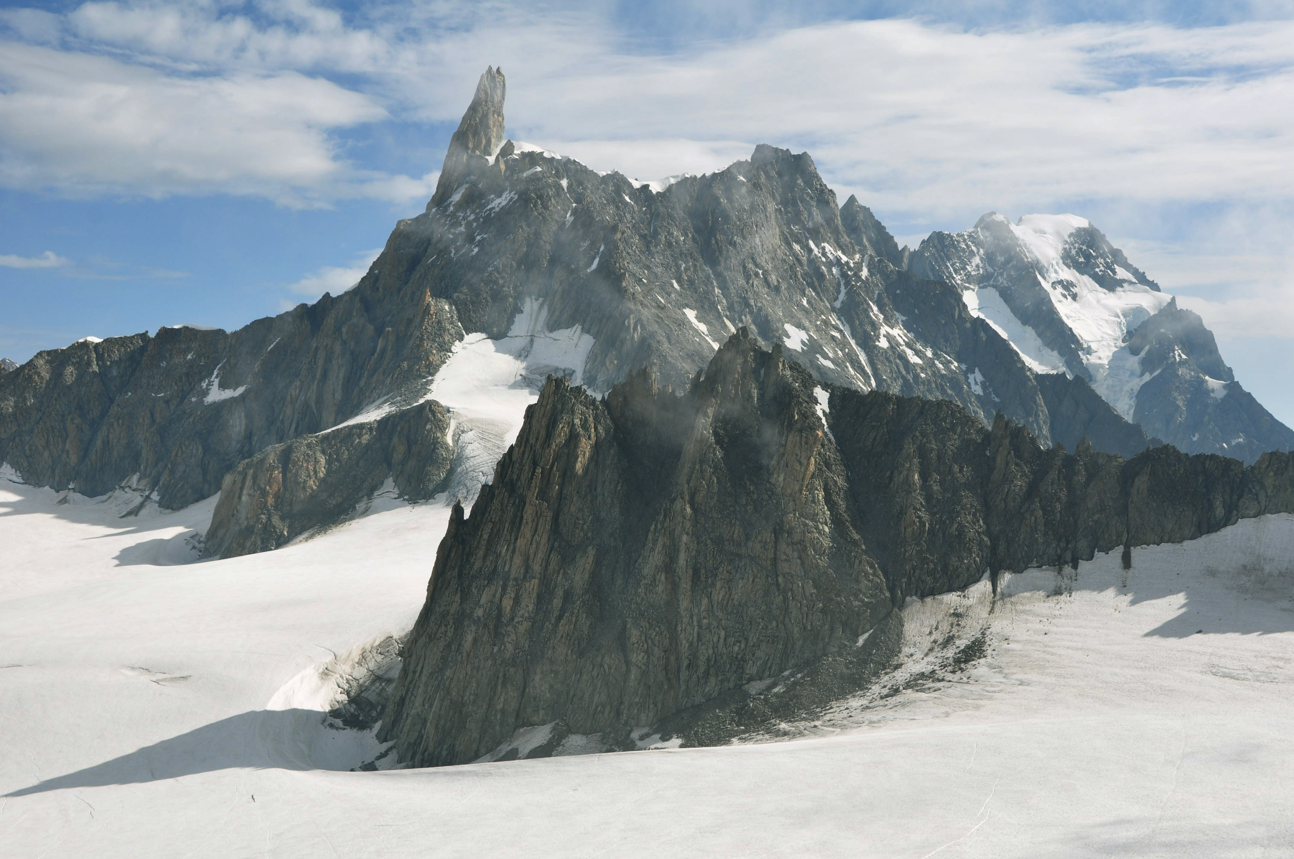 Dente del Gigante This is a photo of a monument which is part of cultural heritage of Italy.